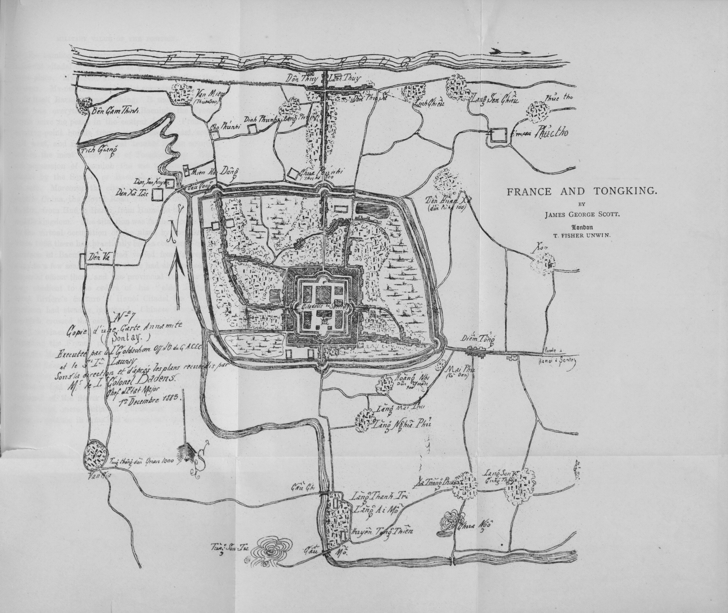 Bản đồ thành Sơn Tây (nay là thị xã Sơn Tây) do J. G. Scott vẽ ngày 1 tháng 12 năm 1883, theo bản đồ của người An Nam được in trong tác phẩm France and Tongking: a narrative of the campaign of 1884 and the occupation of Further India (